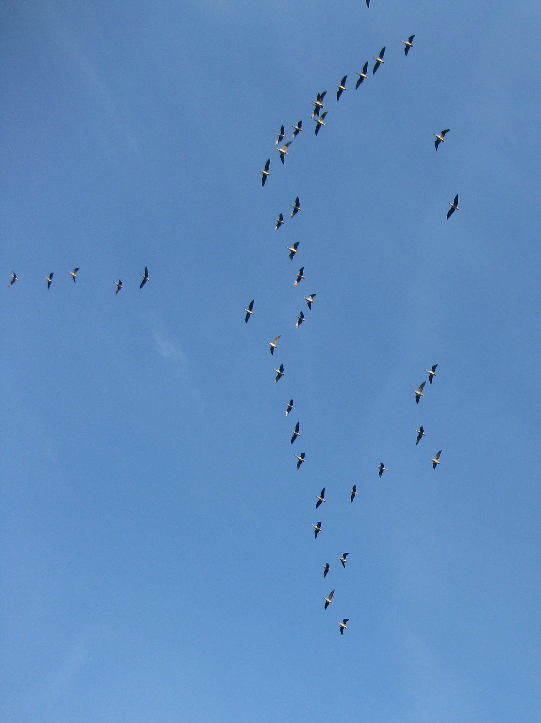 Ruhland, Grenzstraße bei Hausnr. 3, südwestwärts ziehende Graugänse (Anser anser), Herbst